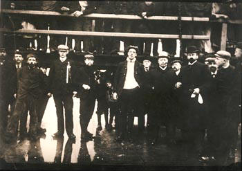 De winnaars van de Eerste Elfstedentocht.